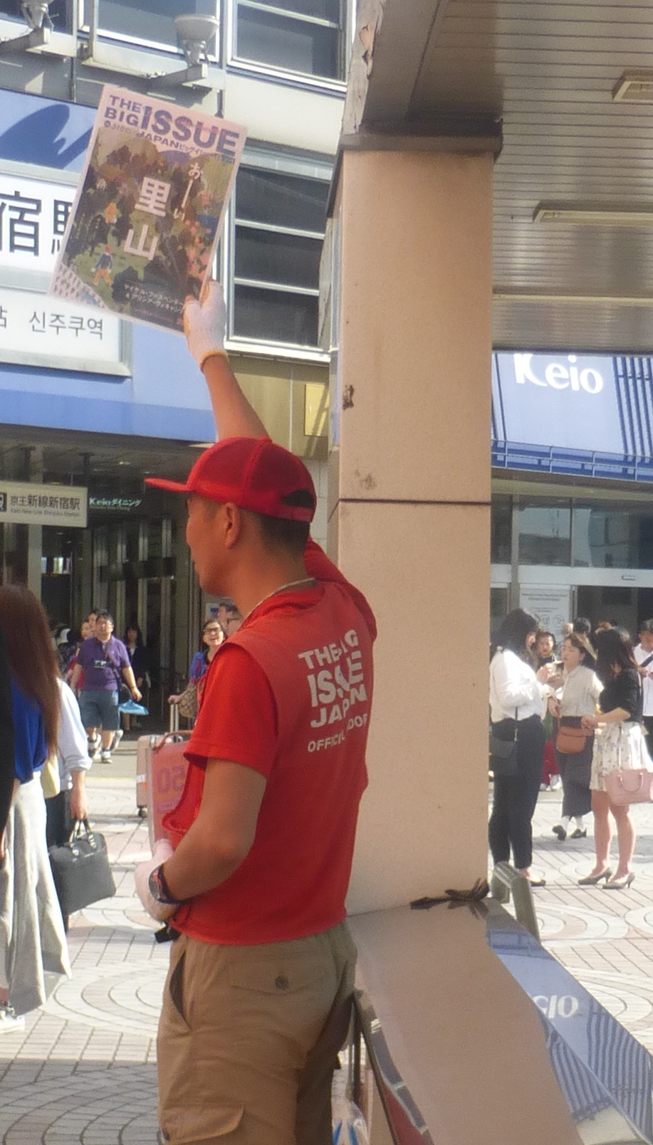 ビッグイシュー（The Big Issue）